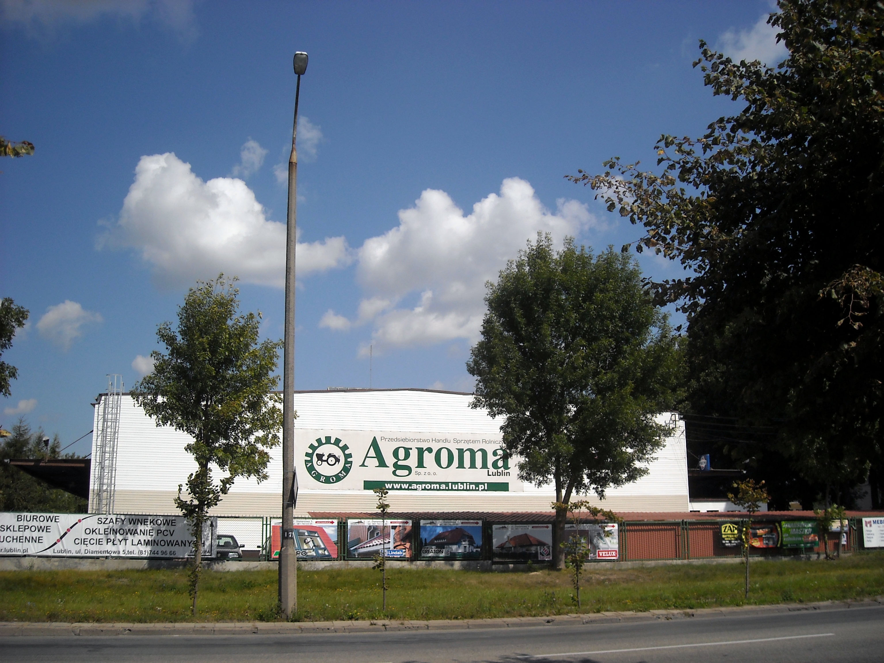 Agroma w Lublinie Sp. z o.o. przy ul. Diamentowej w lubelskiej dzielnicy Wrotków.